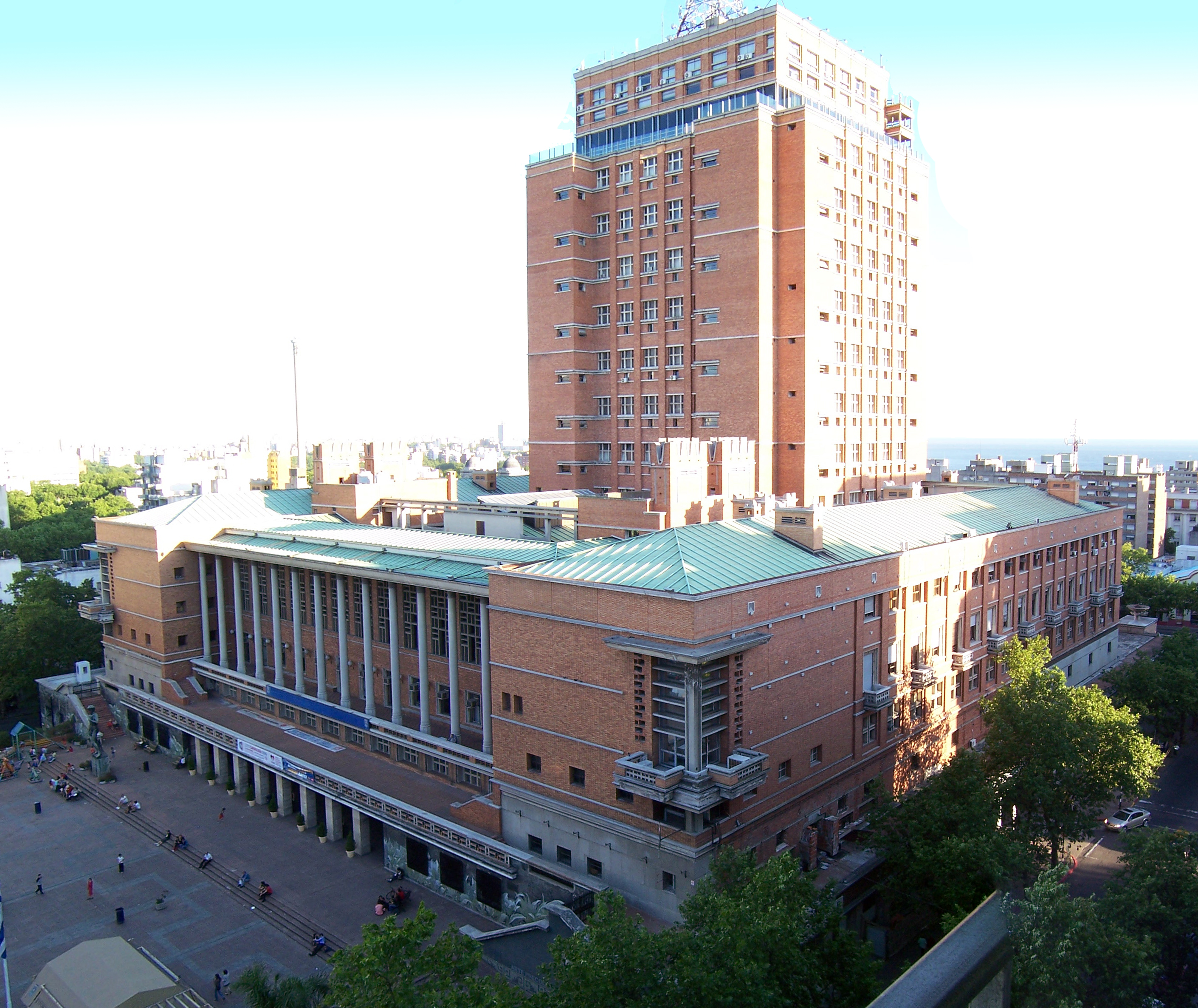 Edificio sede de la Intendencia de Montevideo. Ubicada en el departamento de Montevideo